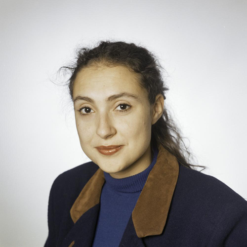 Nicole le Fever.